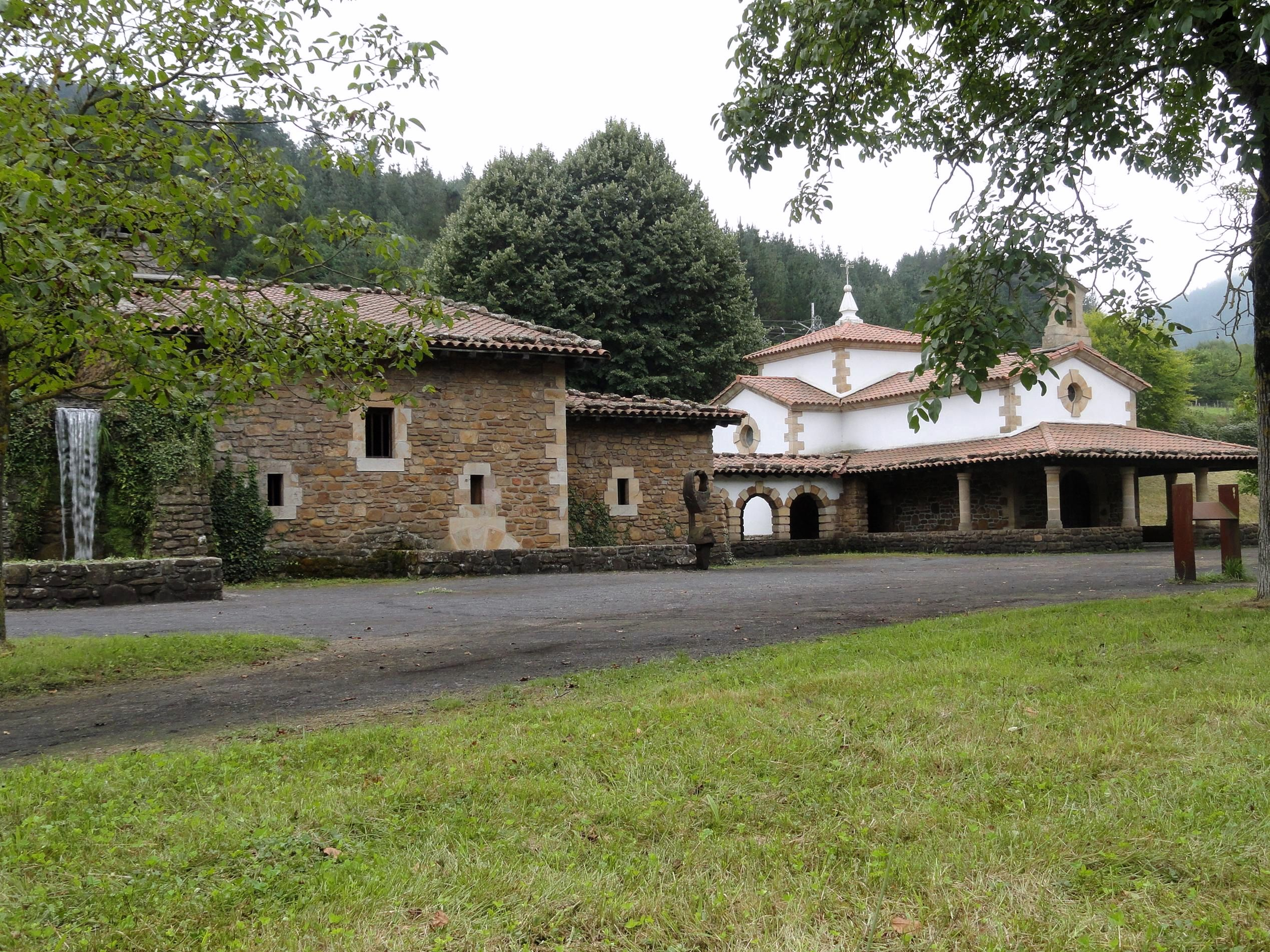 Mirandaola, gaur egun